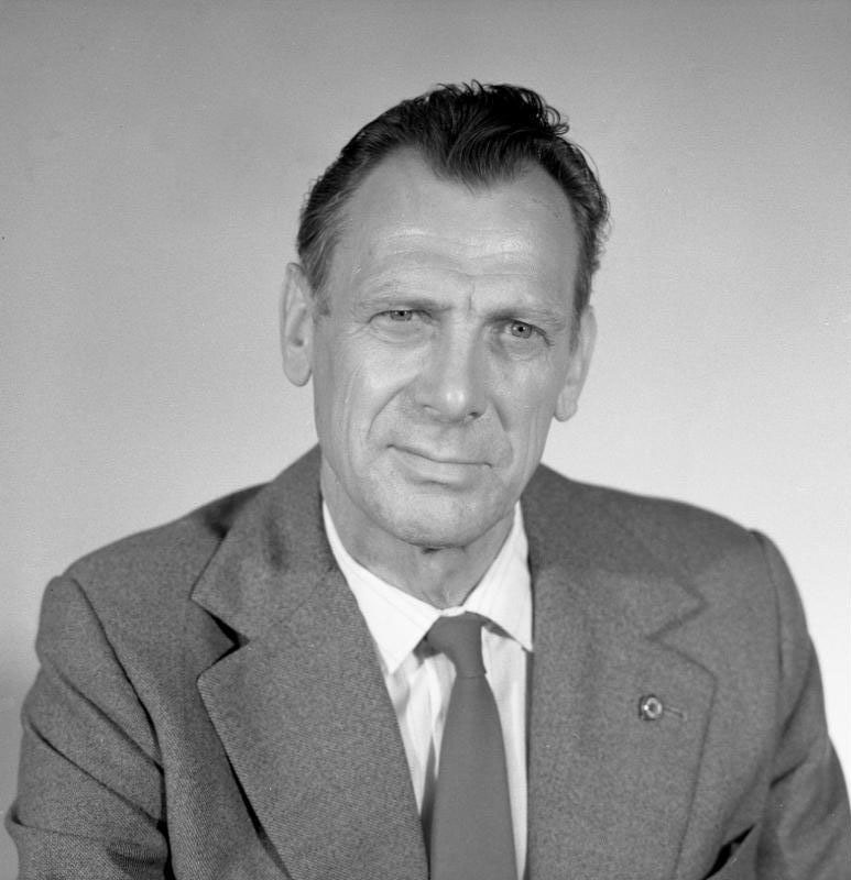 Werner Eberlein ADN-ZB / Schöps /21.4.86 / Berlin: Werner Eberlein, Mitglied des Politbüros des ZK der SED und 1. Sekretär der Bezirksleitung der SED Magdeburg. [Herausgabedatum: 21.06.1983] [Porträt Werner Eberlein]